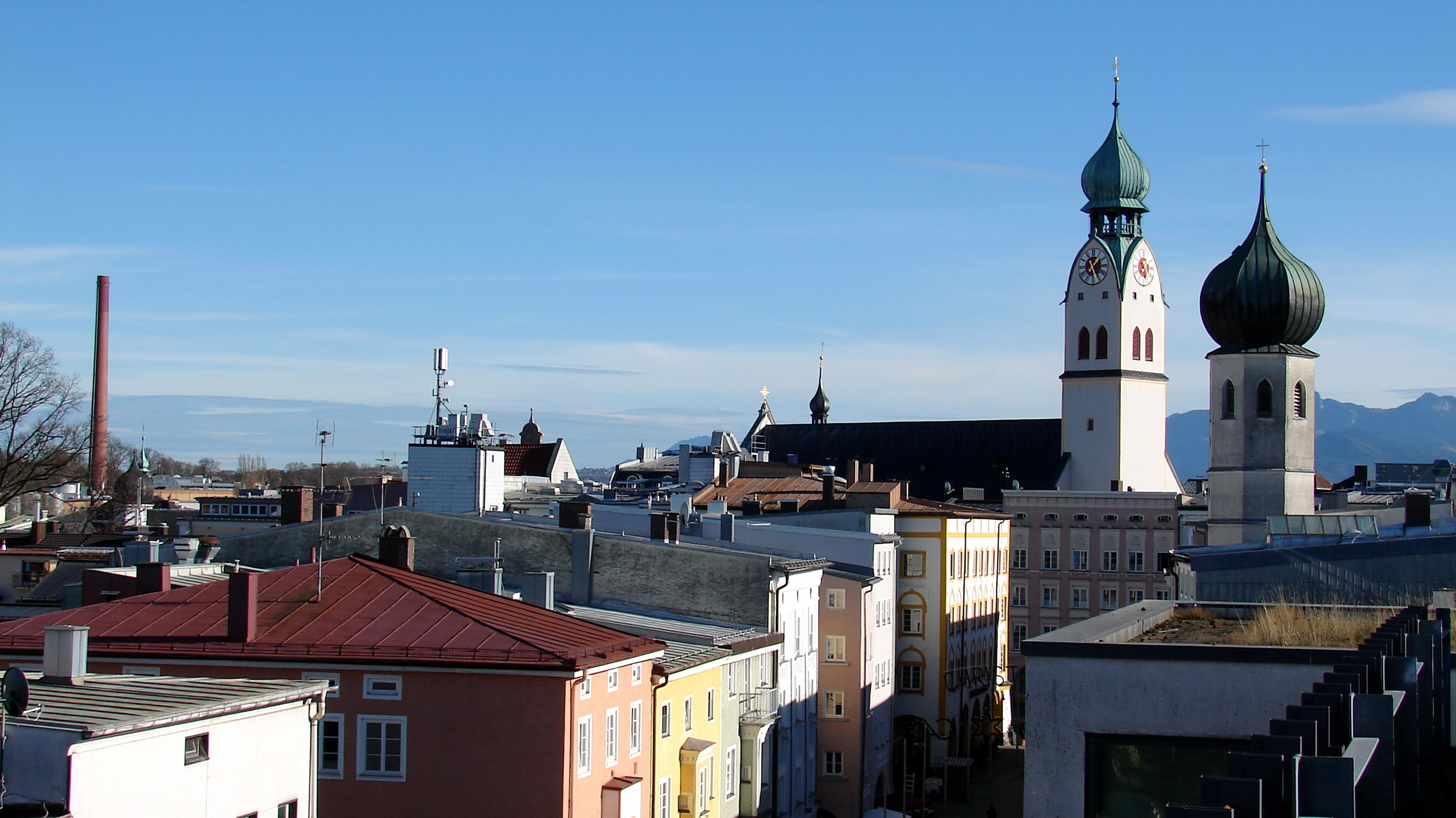 Stadtansicht mit St. Nikolaus und Heilig-Geist-Kirche.